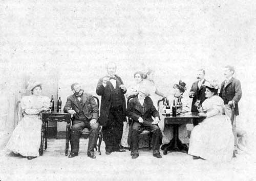 Escena del estreno de la representación de la obra de teatro La de San Quintín, de Benito Pérez Galdós.